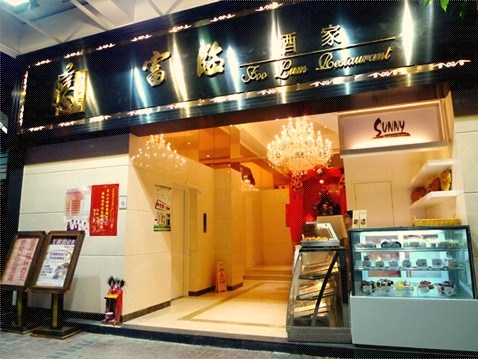 富臨酒家(灣仔店)門面